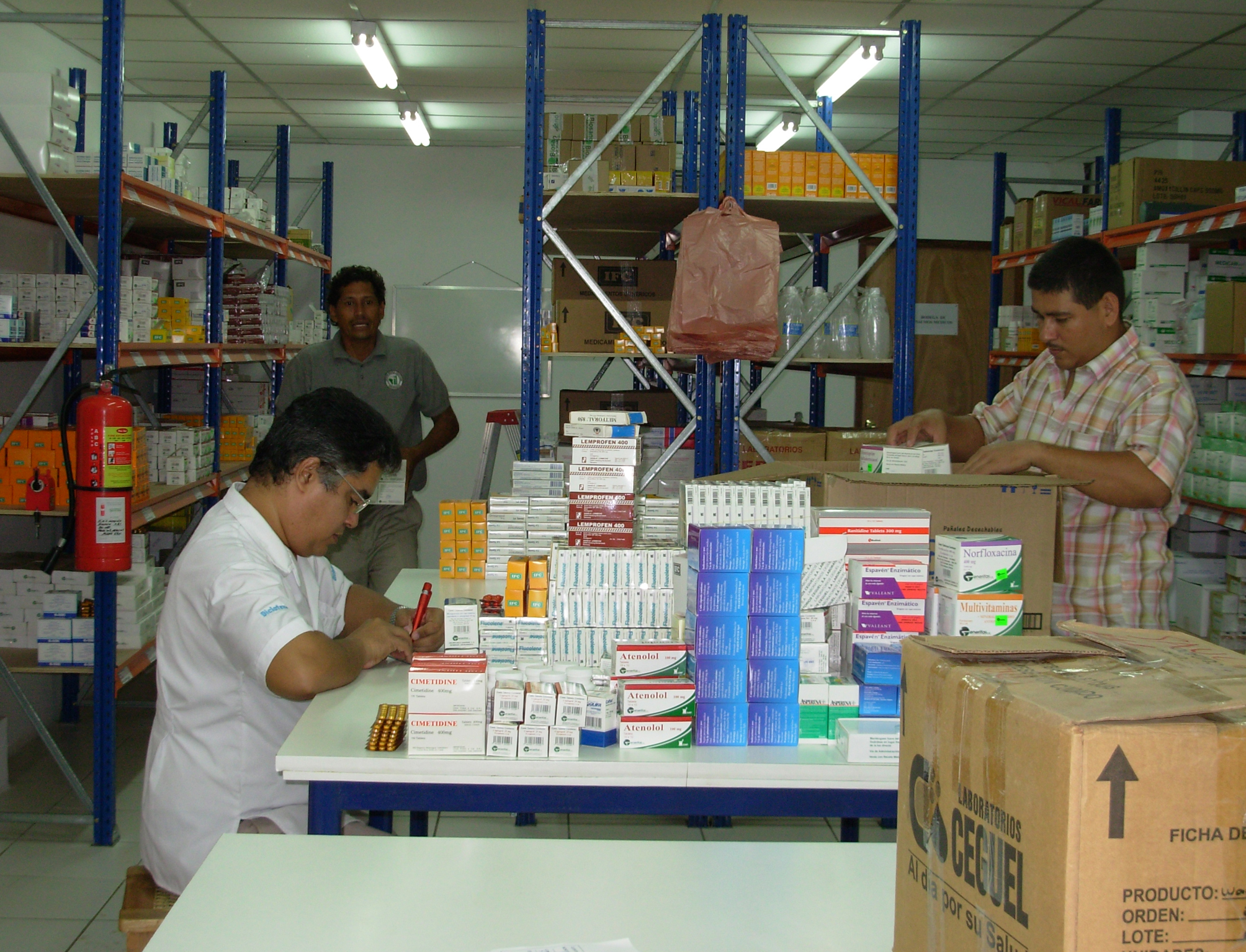 Laboratoria de calidad en Nicaragua